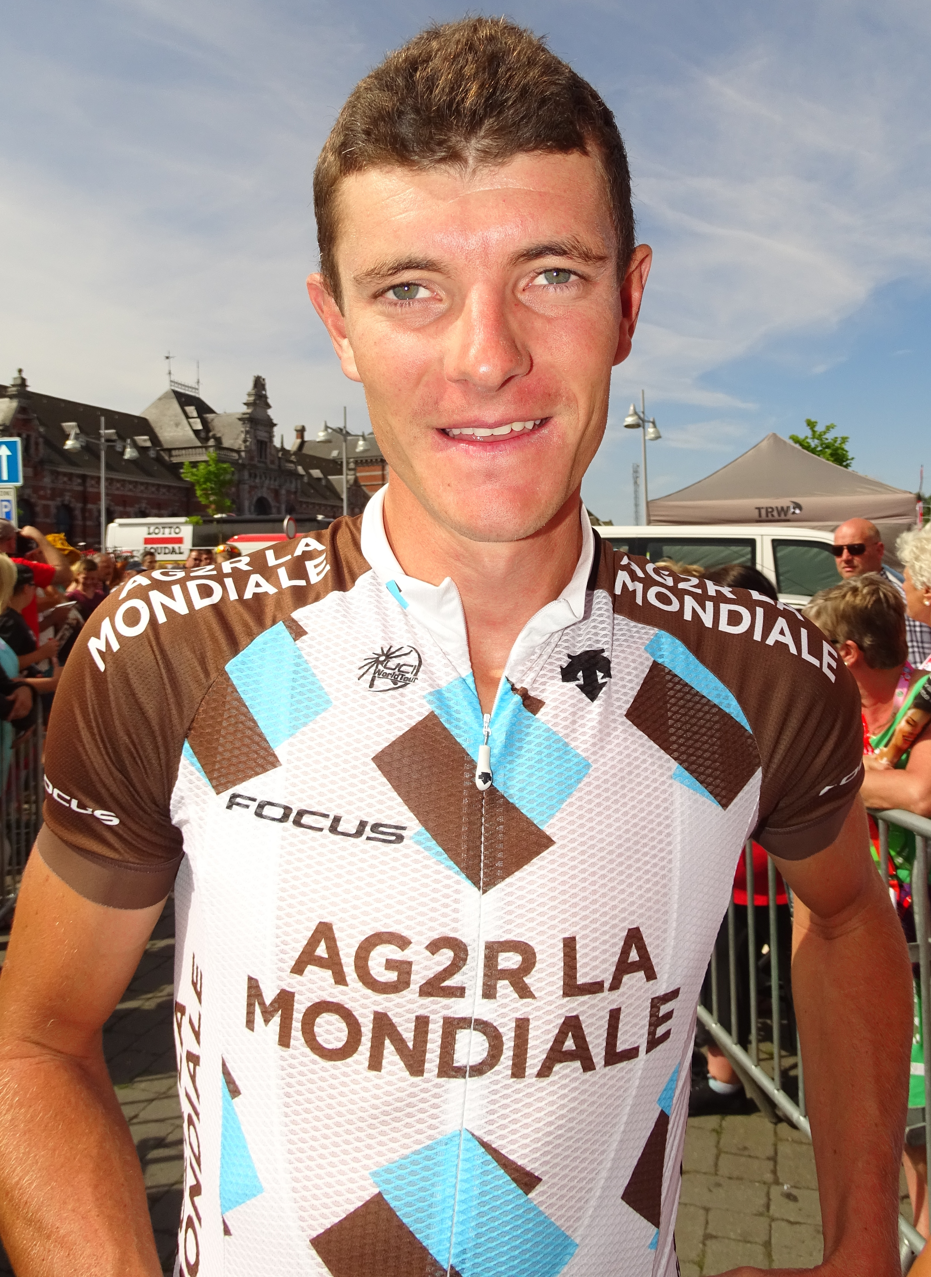 Reportage réalisé le mercredi 22 juillet à l'occasion du départ du Grand Prix Pino Cerami 2015 à Saint-Ghislain, Belgique.